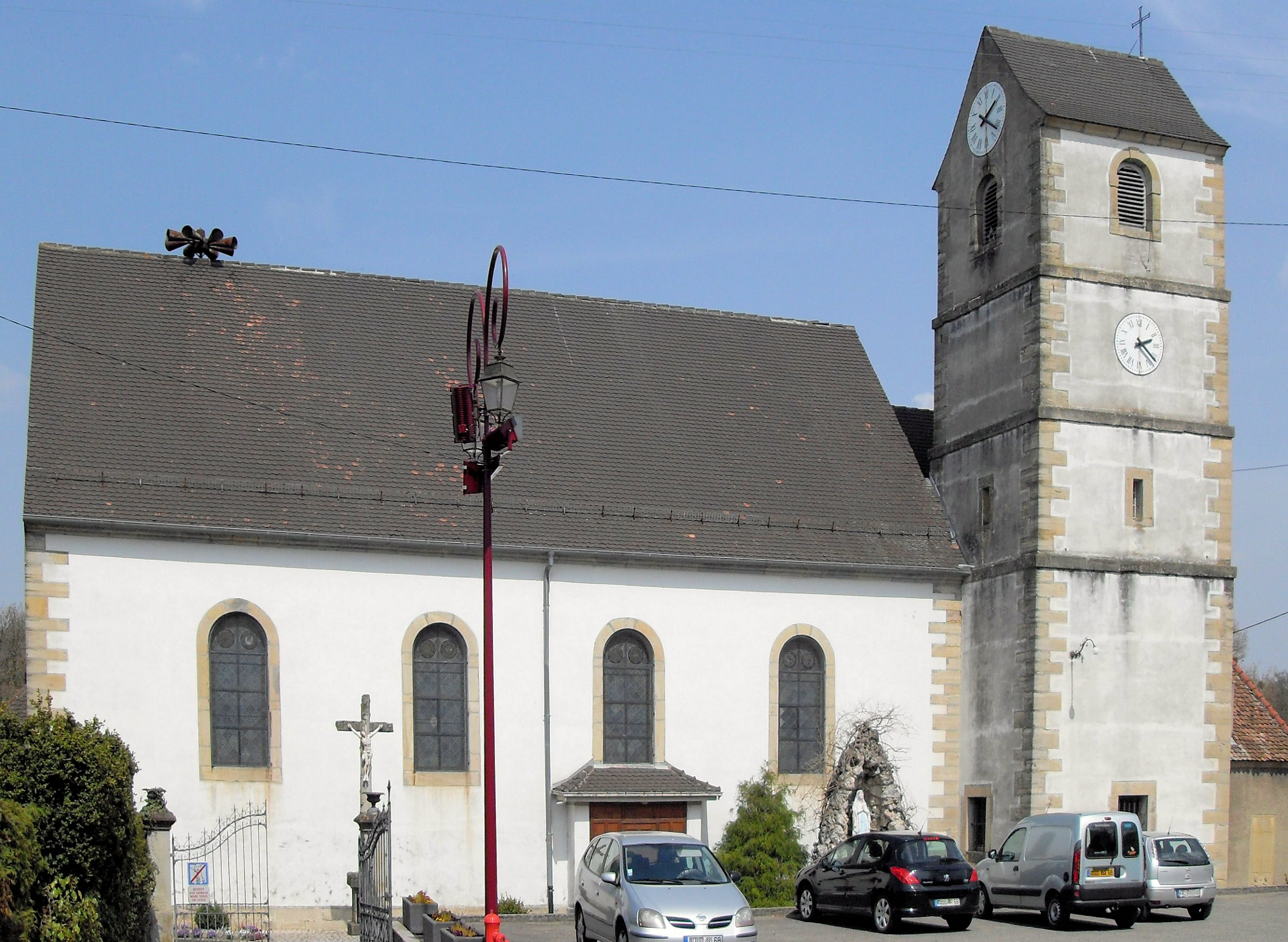 L'église Saint-Martin à Hundsbach